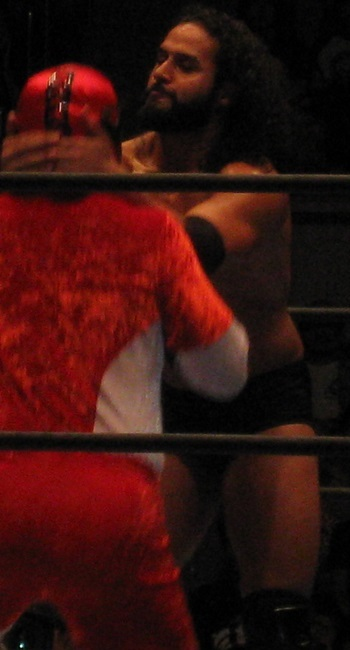 9月29日 神戸大会 「DESTRUCTION」 タマ・トンガ